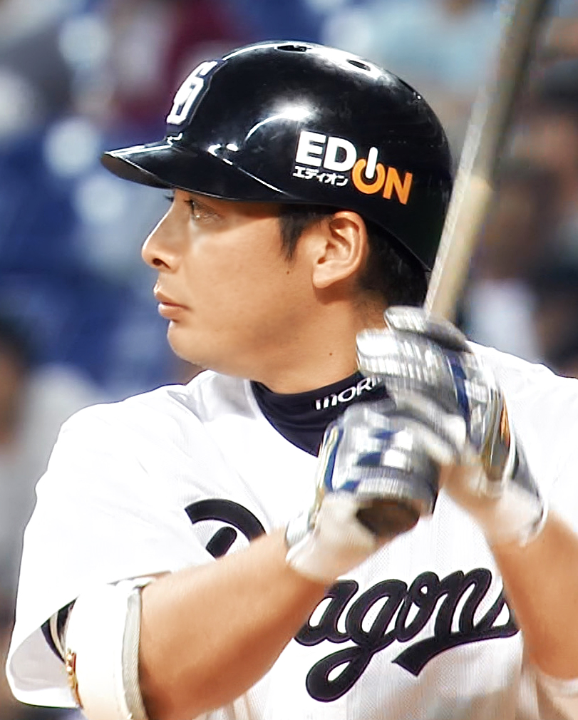 森野将彦 2014年9月12日 ３打点(全打点)